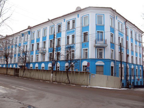 Віцебск. Калініна 3